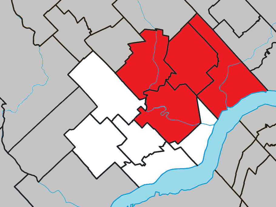 Localisation de la paroisse Sainte-Élisabeth dans la MRC des Chenaux, en Mauricie, au Québec. Auteur du fond de carte : Gordalmighty. C'est moi qui ai coloré sa carte pour situer la paroisse Sainte-Élisabeth.